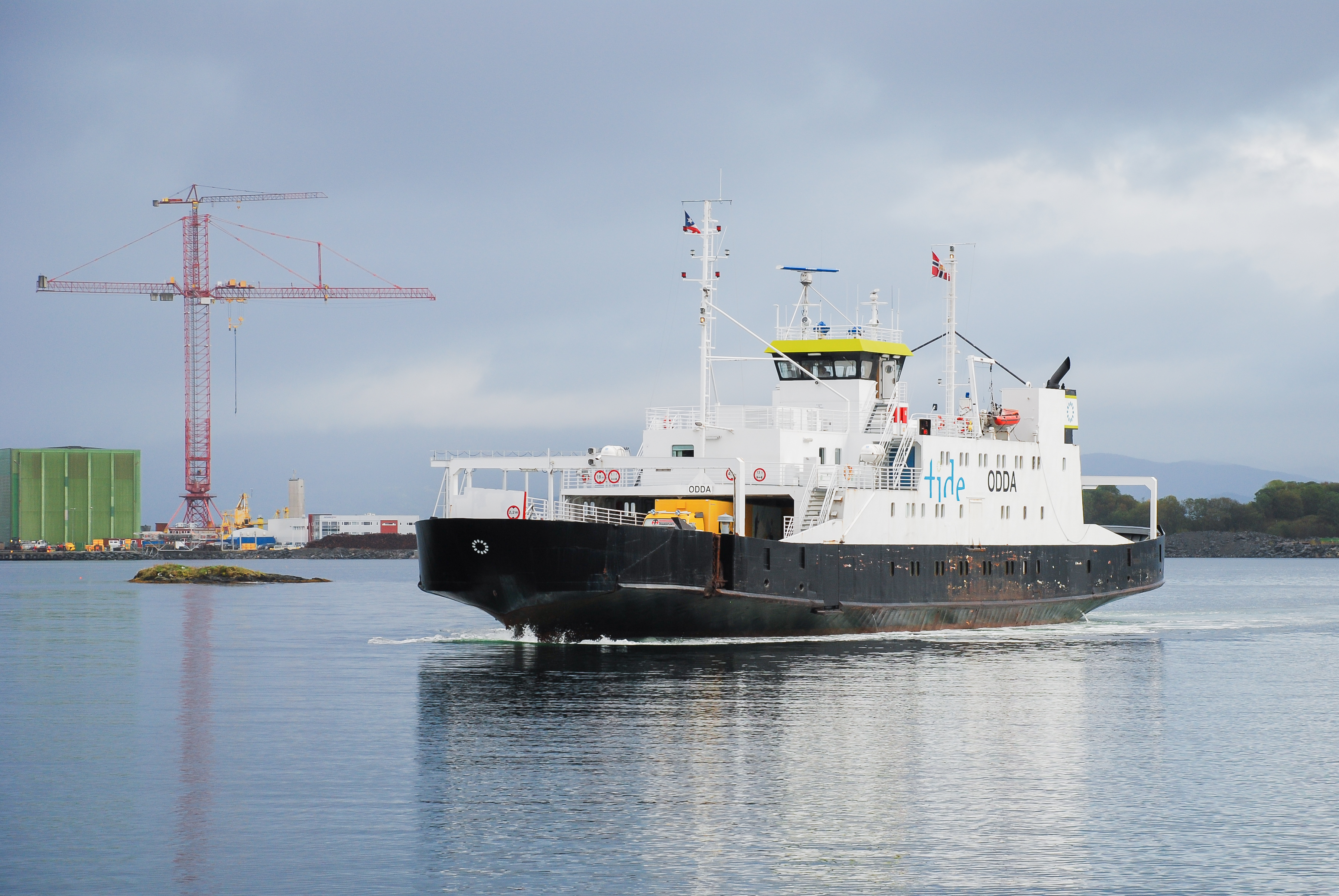 MF Odda, ex. Tau, i rute Ranavik - Skjersholmane Foto Harald Sætre